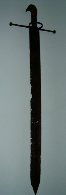 Eksponat broni siecznej przechowywany w Muzeum Ziemi Szprotawskiej